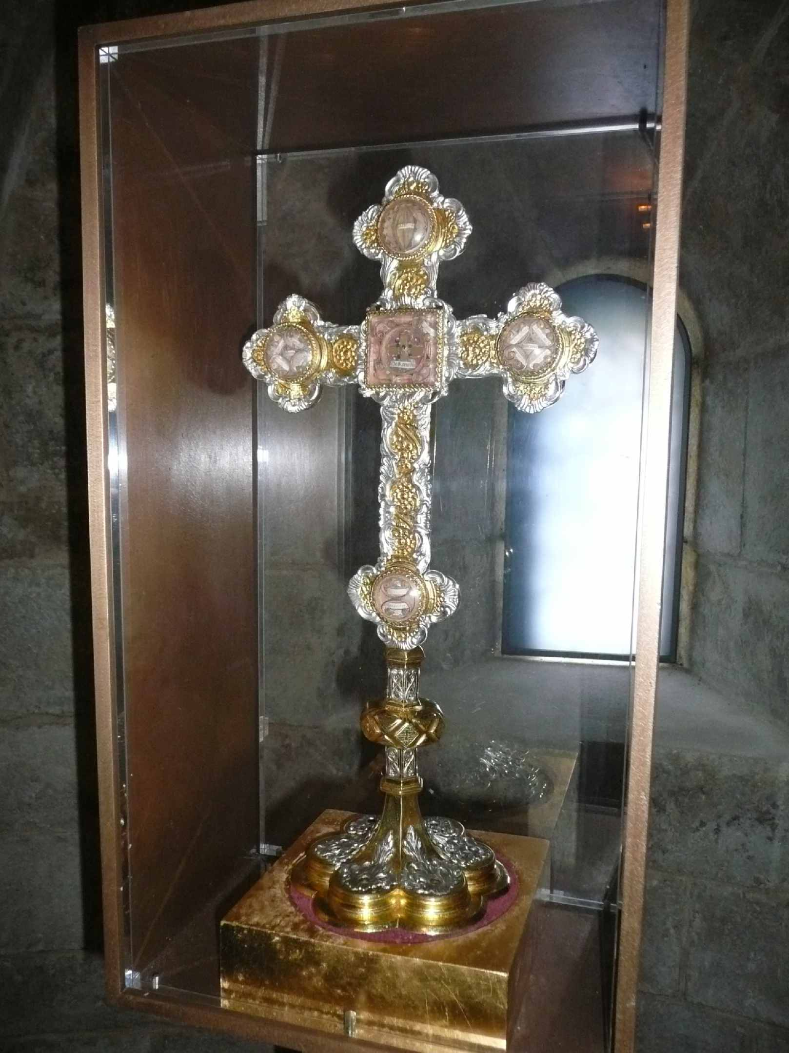 Das Heilig-Kreuzreliquiarin der Krypta